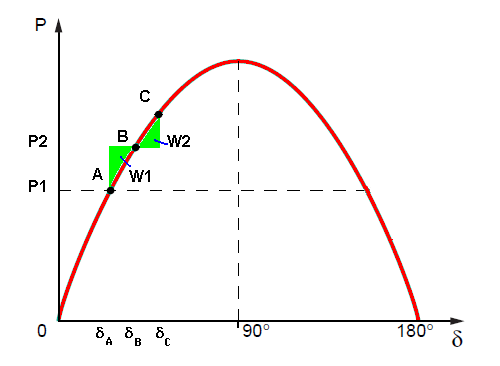 équilibre des aires pour un générateur électrique synchrone.